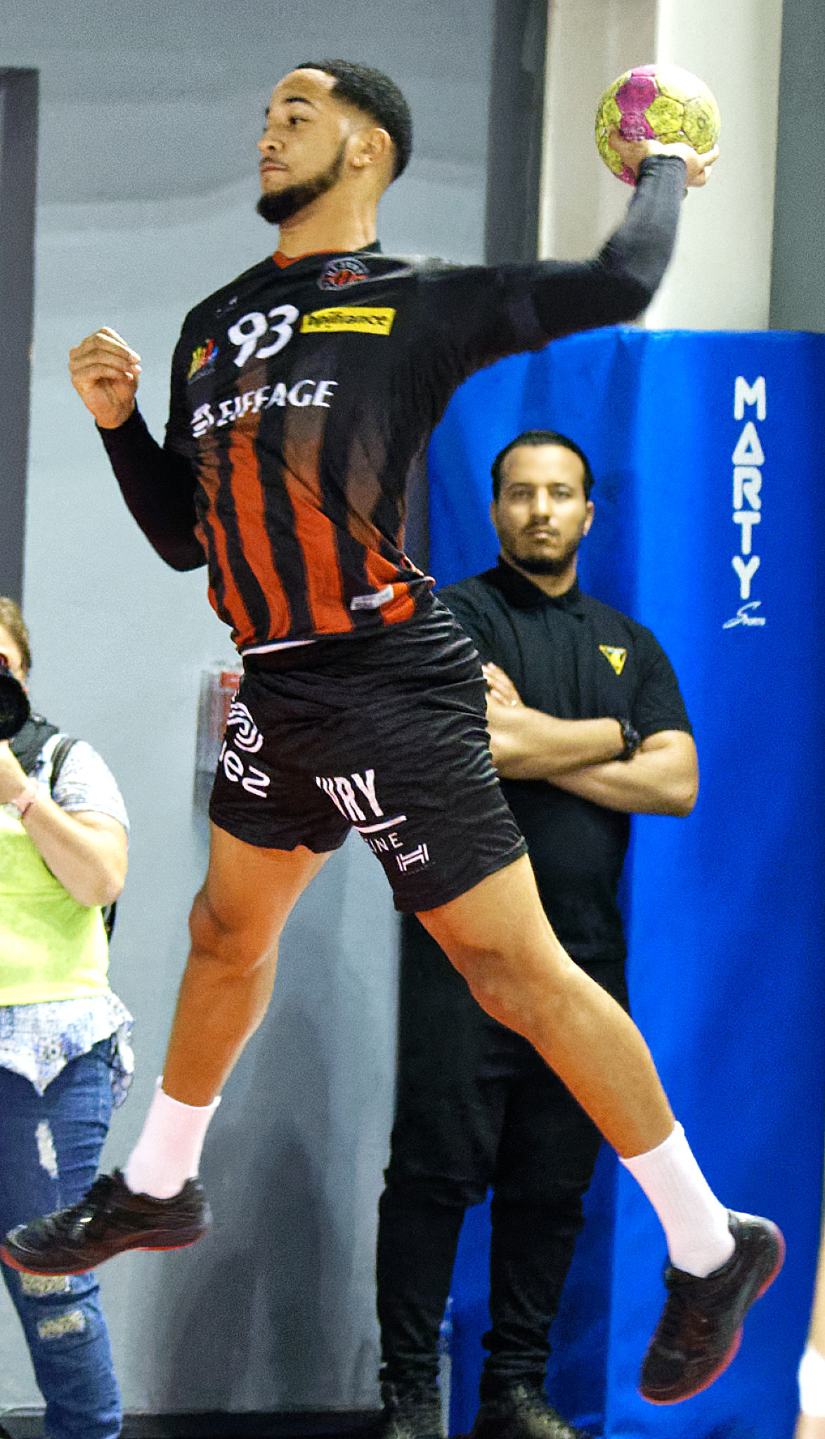 Rencontre de championnat entre l'US Ivry et Montpellier. A Ivry, le 28 septembre 2016.